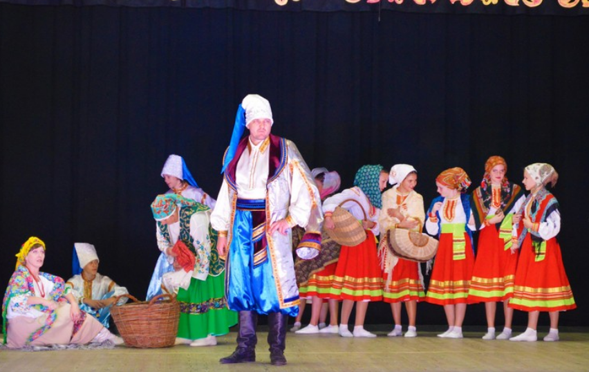 театрализованные представления в ладожском дк